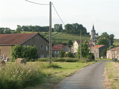 vue